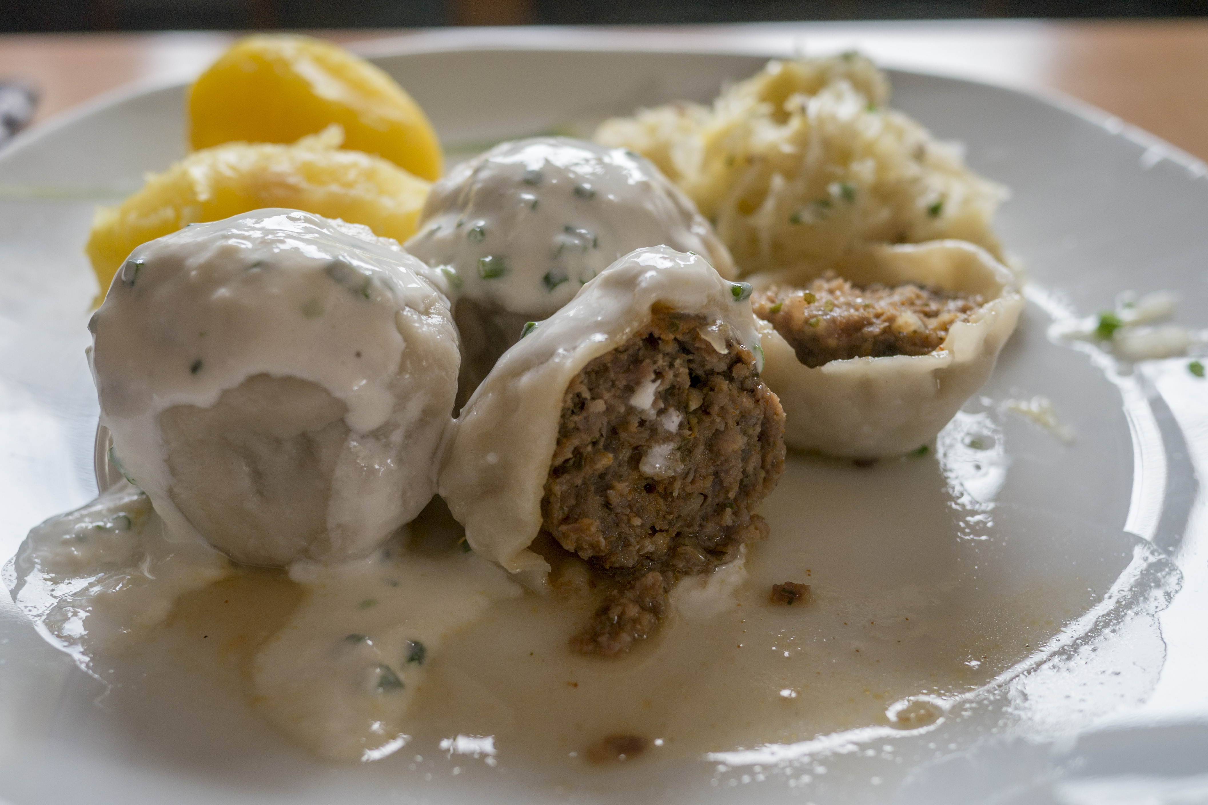 Bratknödel mit 50% Schweine- und 50% Rindfleisch, sowie Zwiebel und Paprikapulver nebst Pfeffer und Salz.